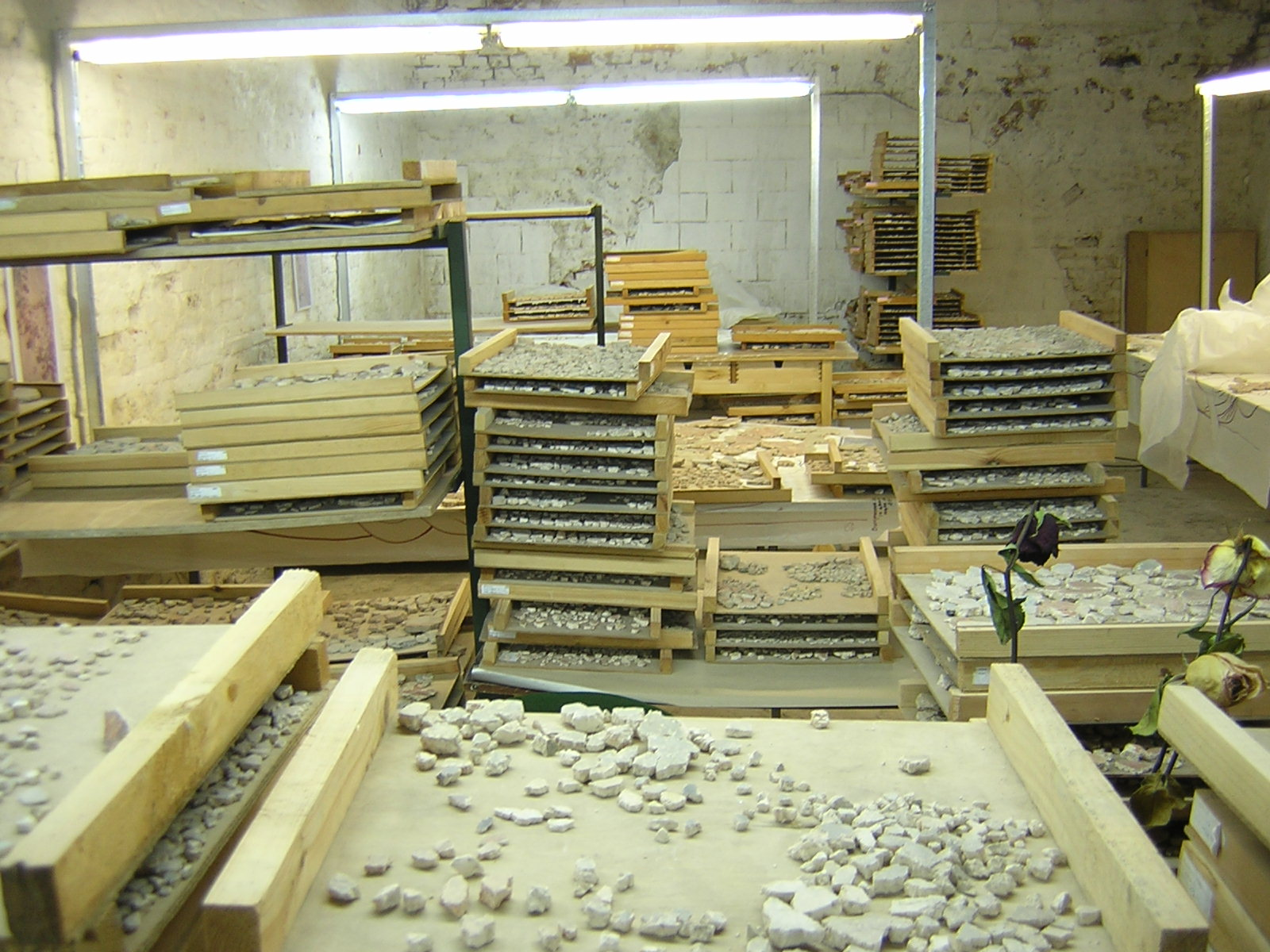 Мастерская, в которой реставраторы восстанавливают разрушенные фрески.